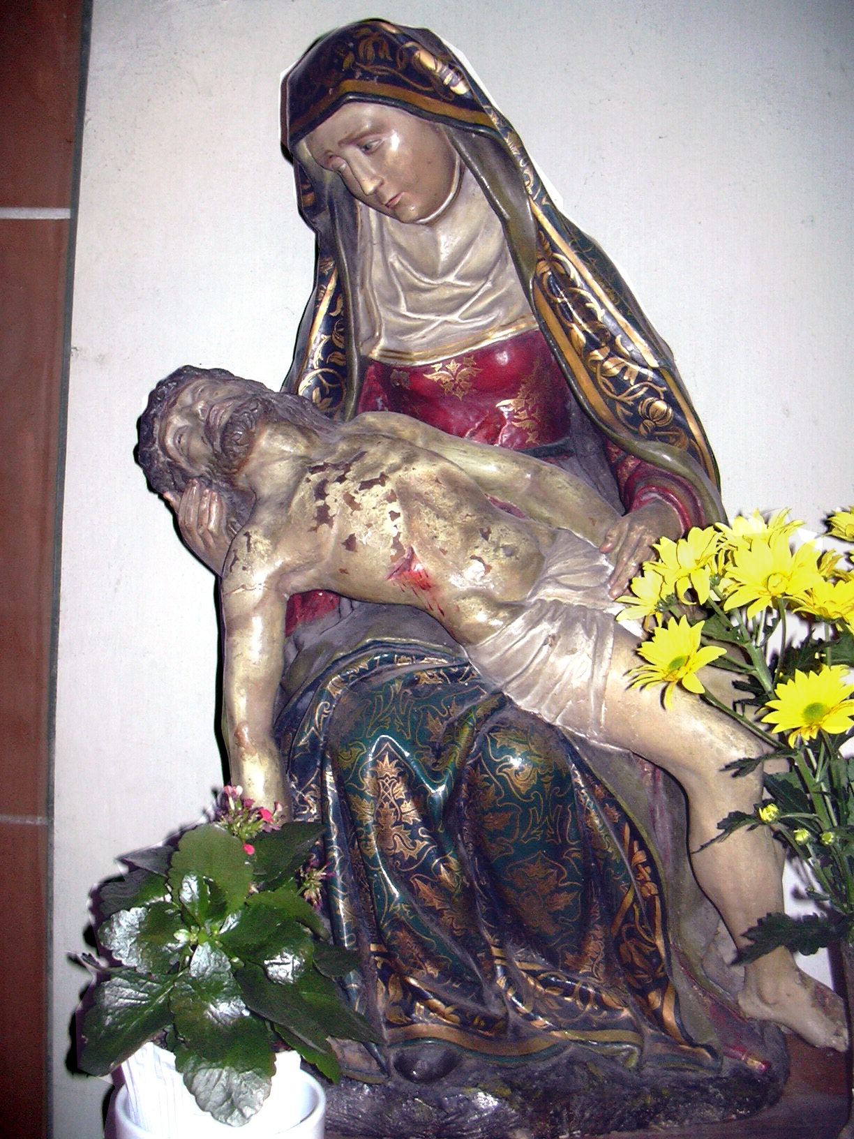 St. Peter and Paul, Remagen: Pietà, around 1600